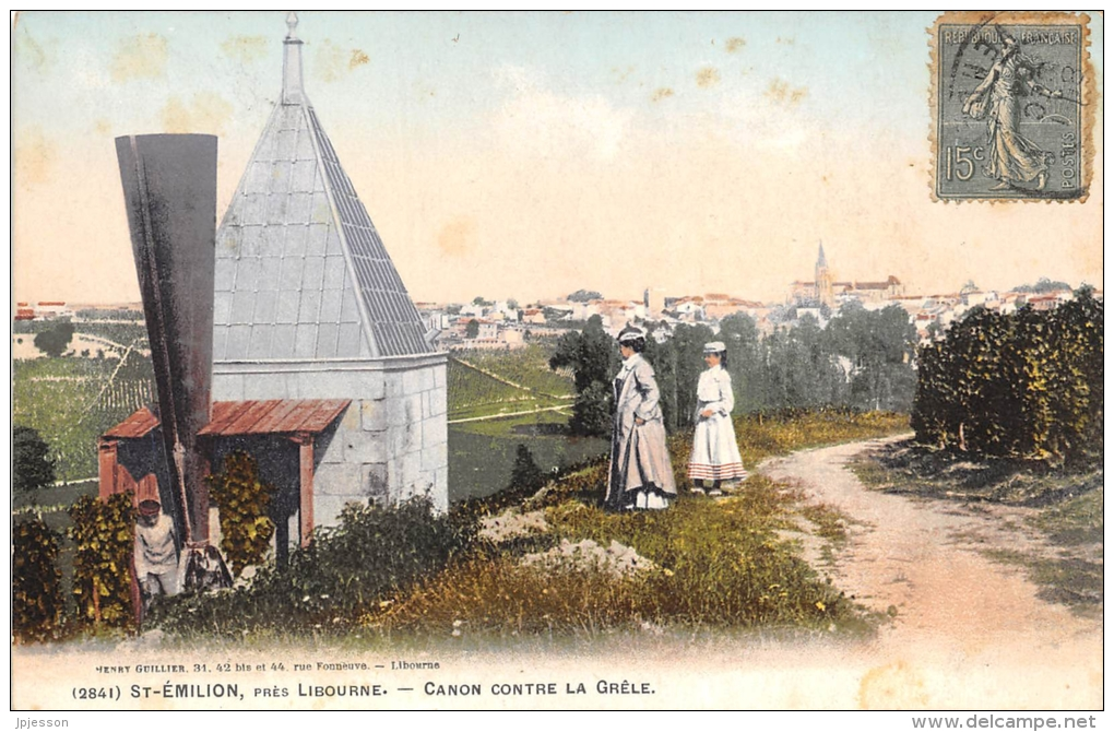 Saint-Emilion - canon contre la grêle